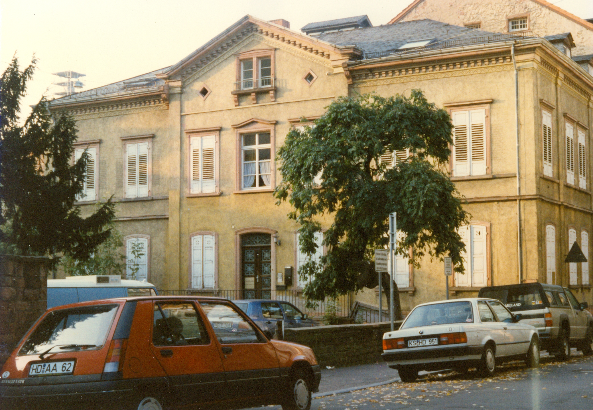 Anna Blum Haus 1995 Gebäude in der Theaterstraße 10 in Heidelberg, ehemaliges Wohnhaus von Anna Blum (Schriftführerin im Badischen Frauenverein), heute Sitz des Deutschen Frauenrings e.V. / Ortsring Heidelberg